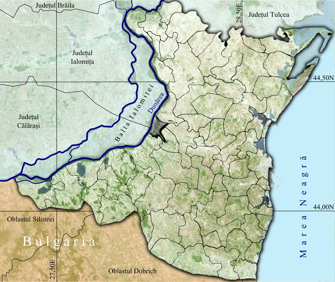 Cernavoda jud Constanta.jpg